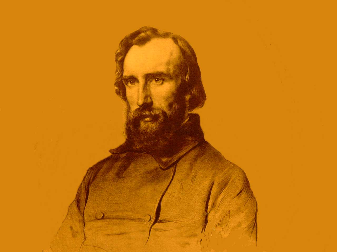 Portrait d'Henri-Frédéric Amiel à la mine de plomb par Joseph Hornung, 1852.